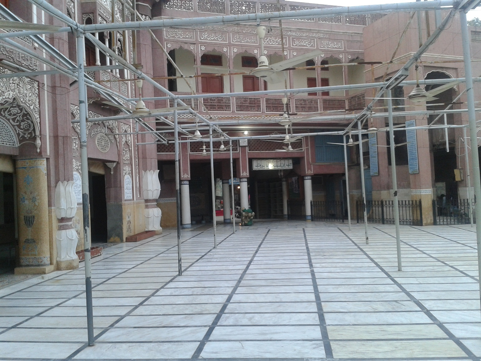 Interior Ghausia Masjid, Katchery Bazar, Okara